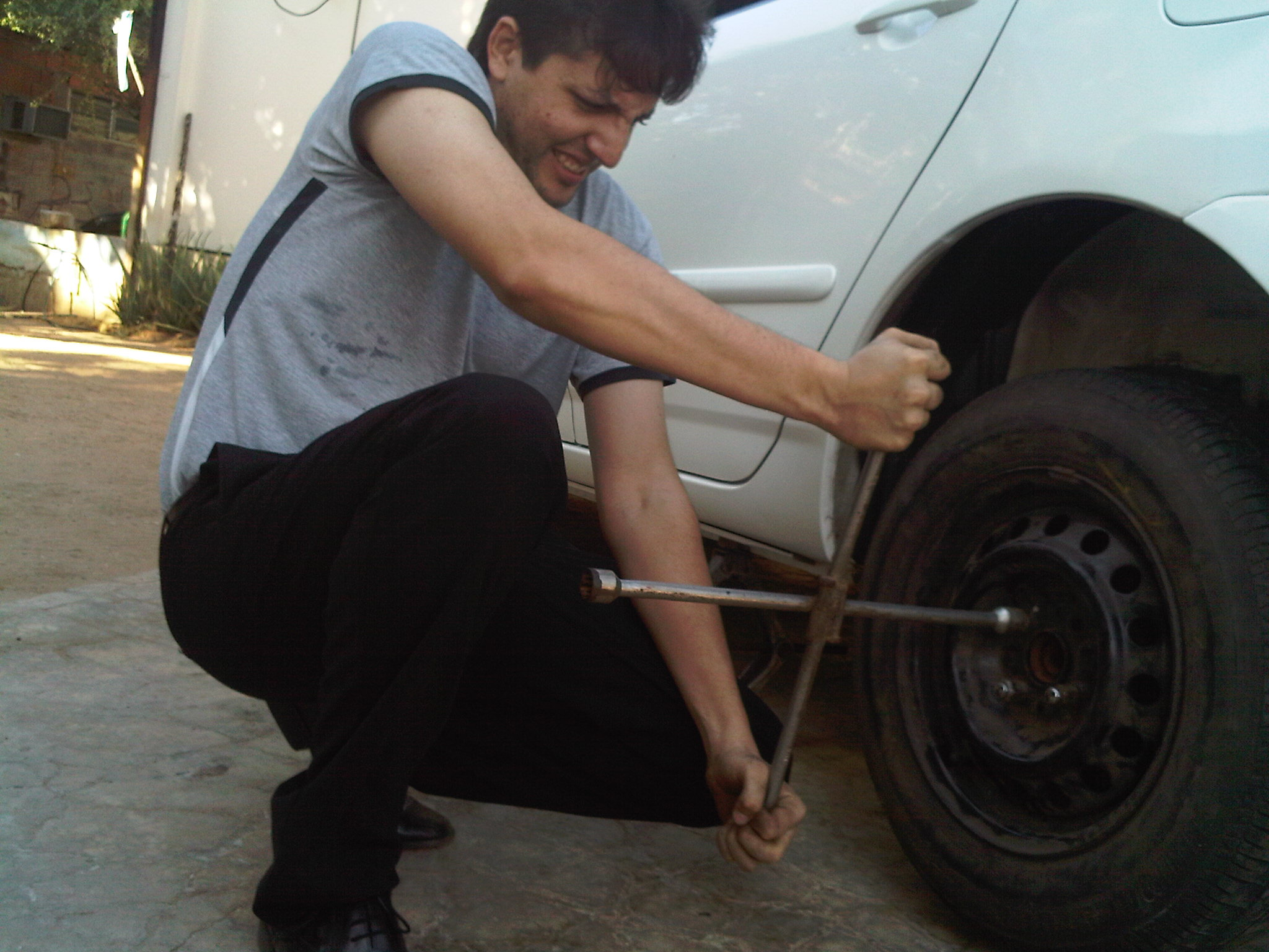 Yo mismo cambiando una llanta o caucho